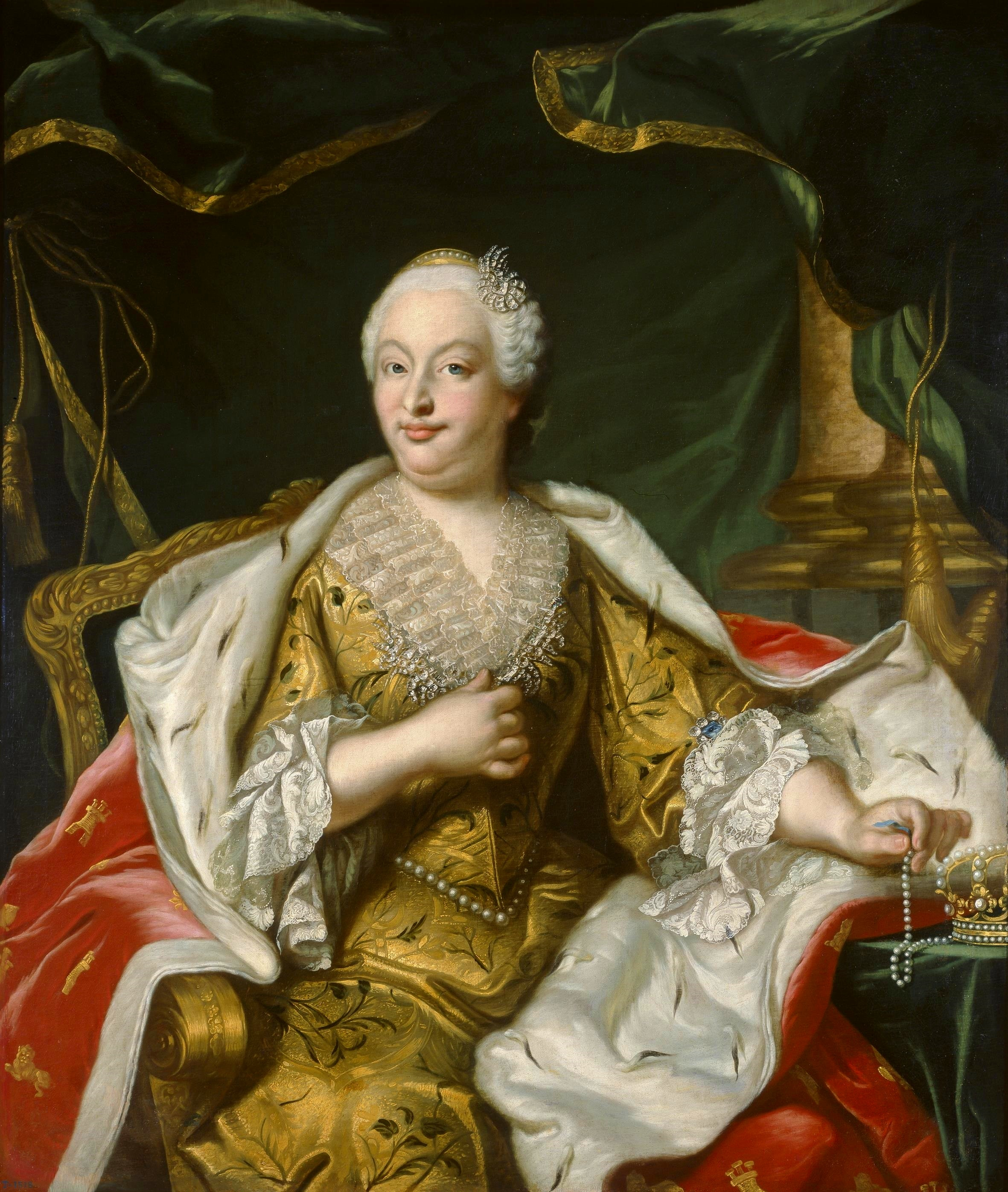 Retrato de la reina Bárbara de Braganza (1711-1758), que fue hija del rey Juan V de Portugal y de la reina María Ana de Austria .